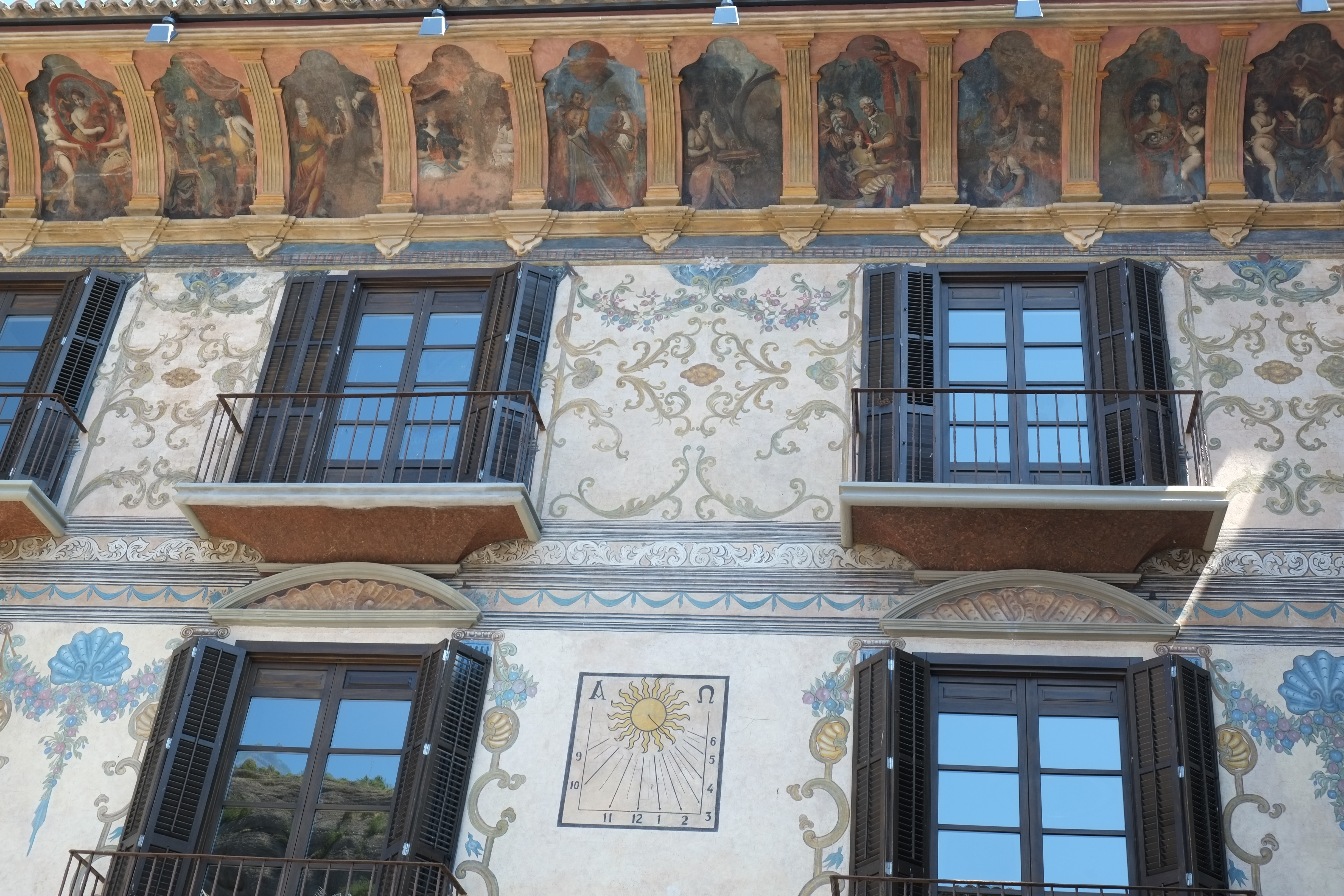 Casa Heredia in Graus in der Provinz Huesca in Aragonien (Spanien)